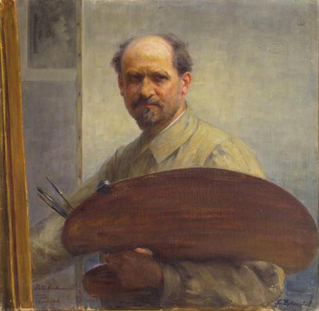 Fotografija slike Rista Vukanović Portret, Preneto sa sajta